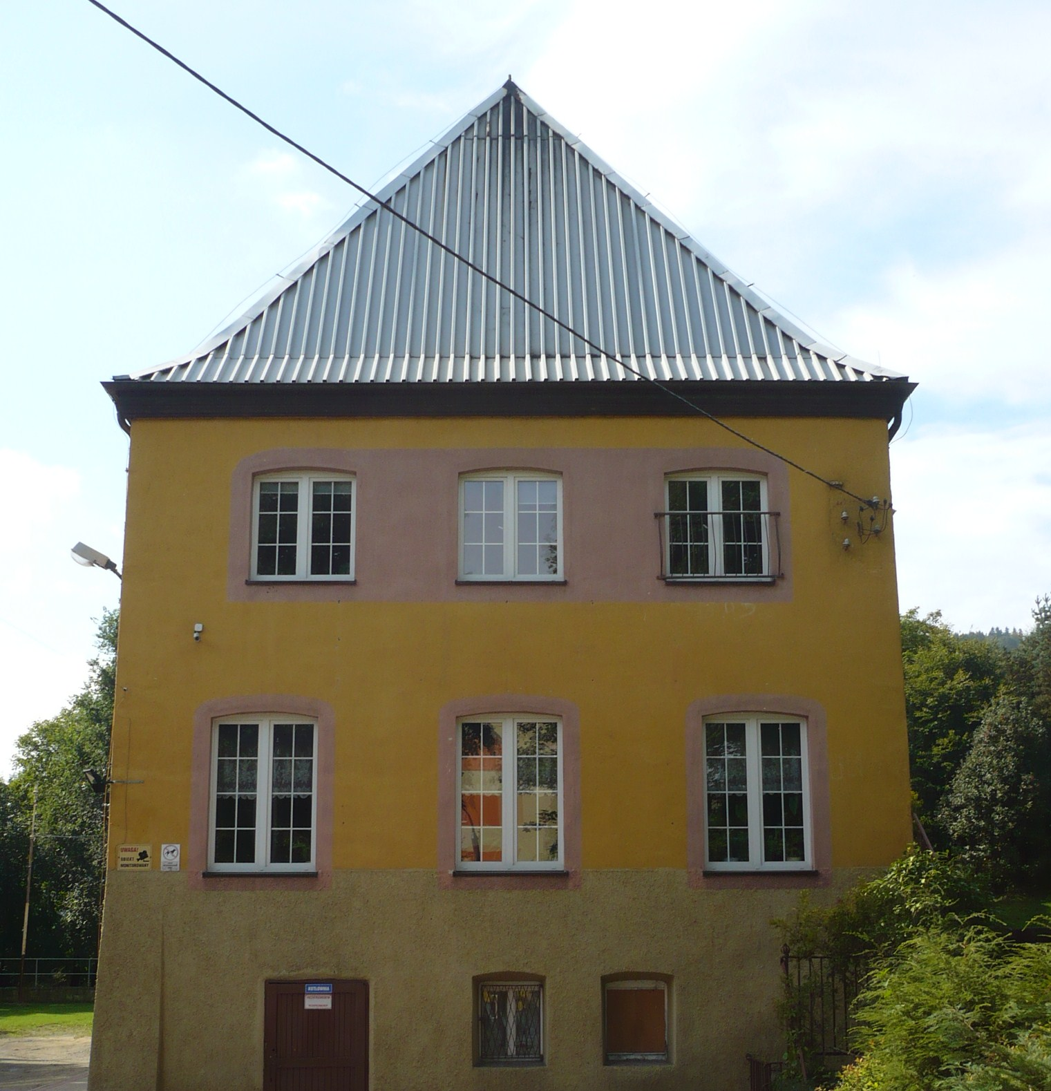 Nowa Ruda, ul. Sportowa 2 - pierwotnie siedziba Hitlerjugend, po 1945 Szkoła Podstawowa nr 2 im. Janusza Korczaka, 1938